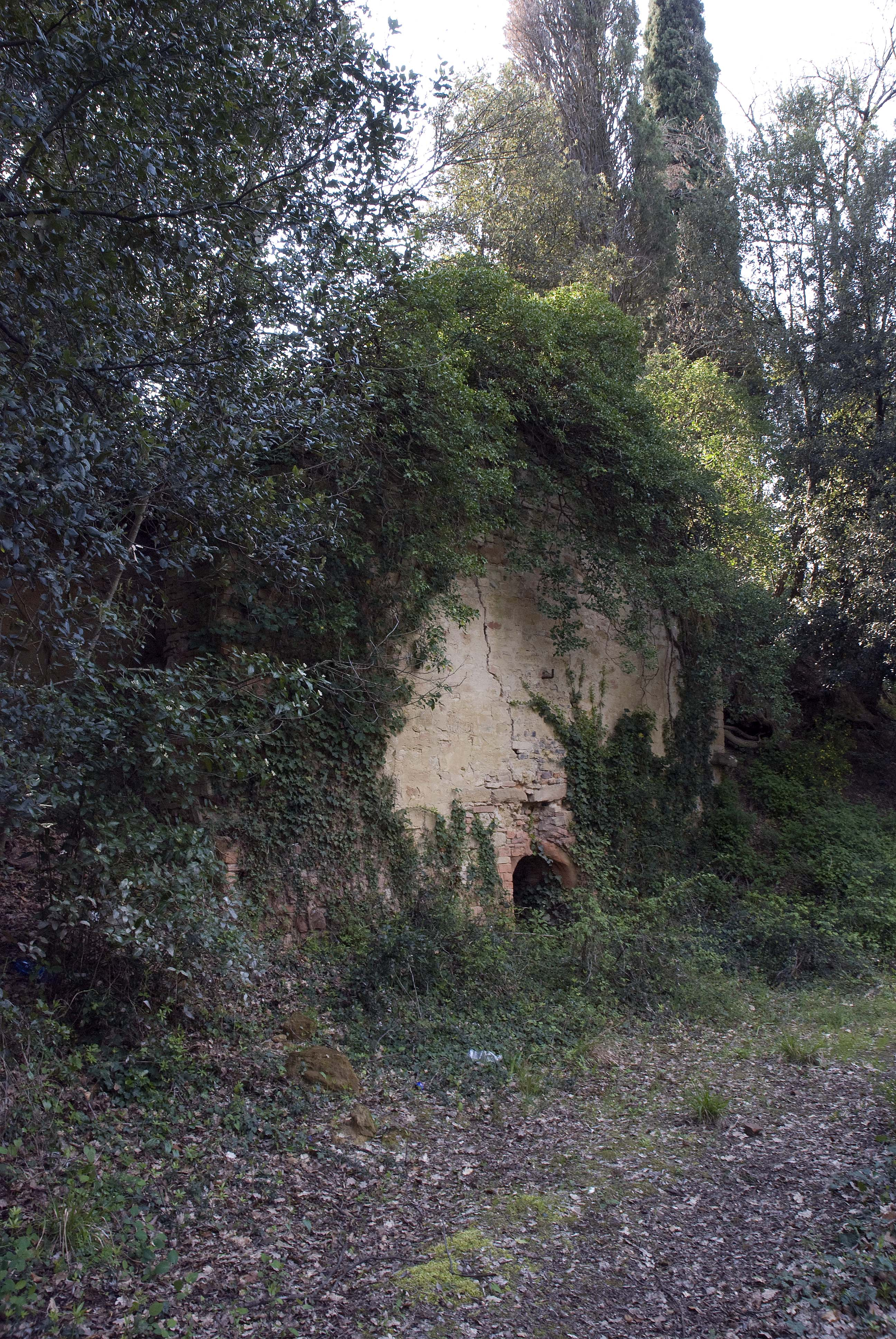 ruderi di una fornace a semifonte